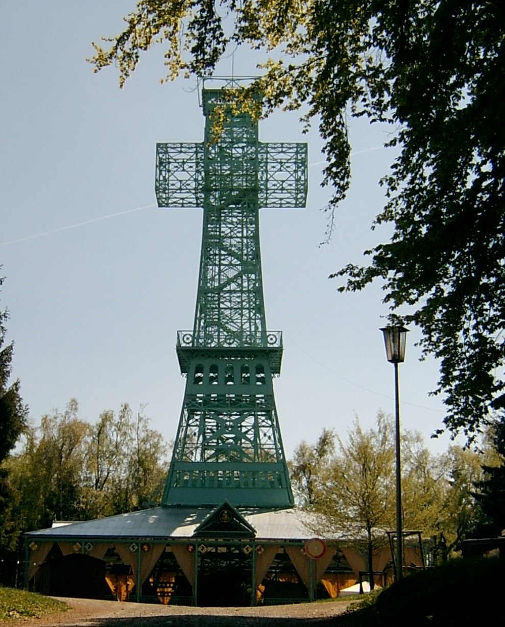 Das Josephskreuz.